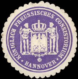 Sealing stamp Title: Königlich Preussisches Consistorium - Hannover Description: lila, weiß, geprägt Place: Hannover size: 4 cm